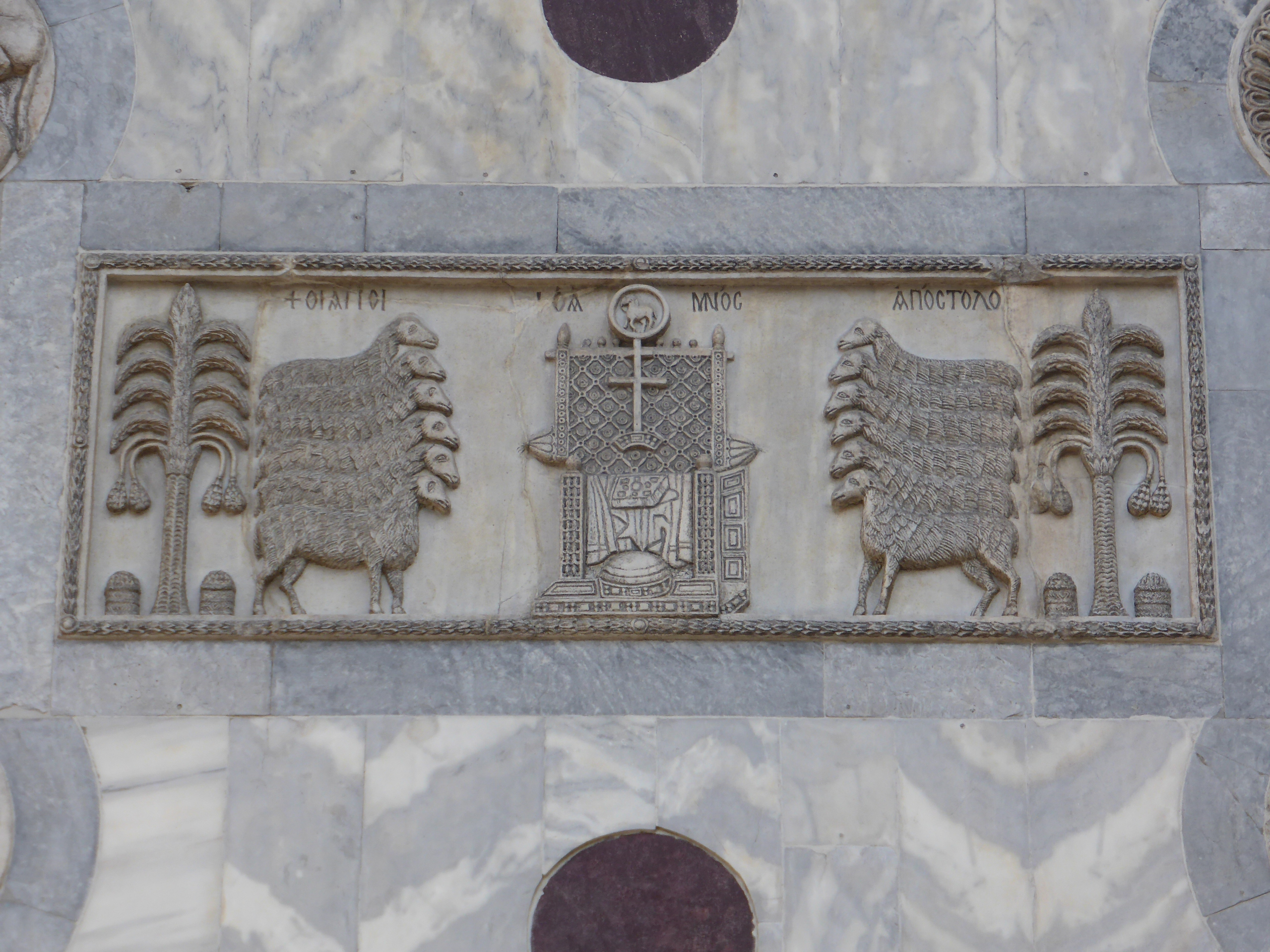 Etimasia-Relief, byzantinische Spolie